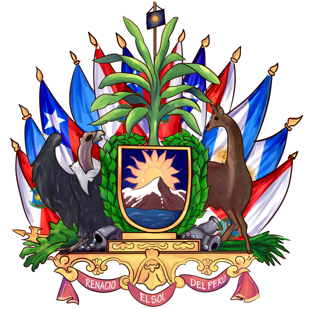 Primer Escudo del Perú